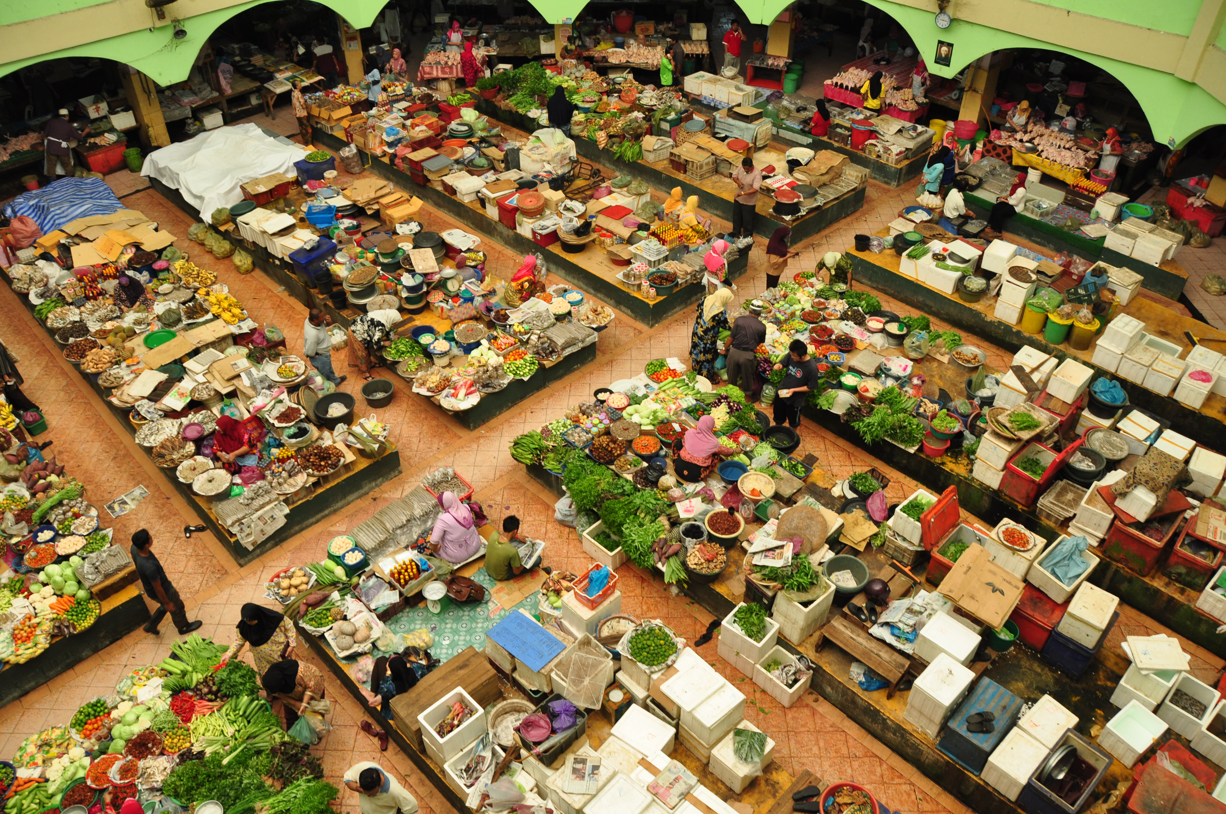 Pasar Besar Siti Khadijah, Kota Bharu